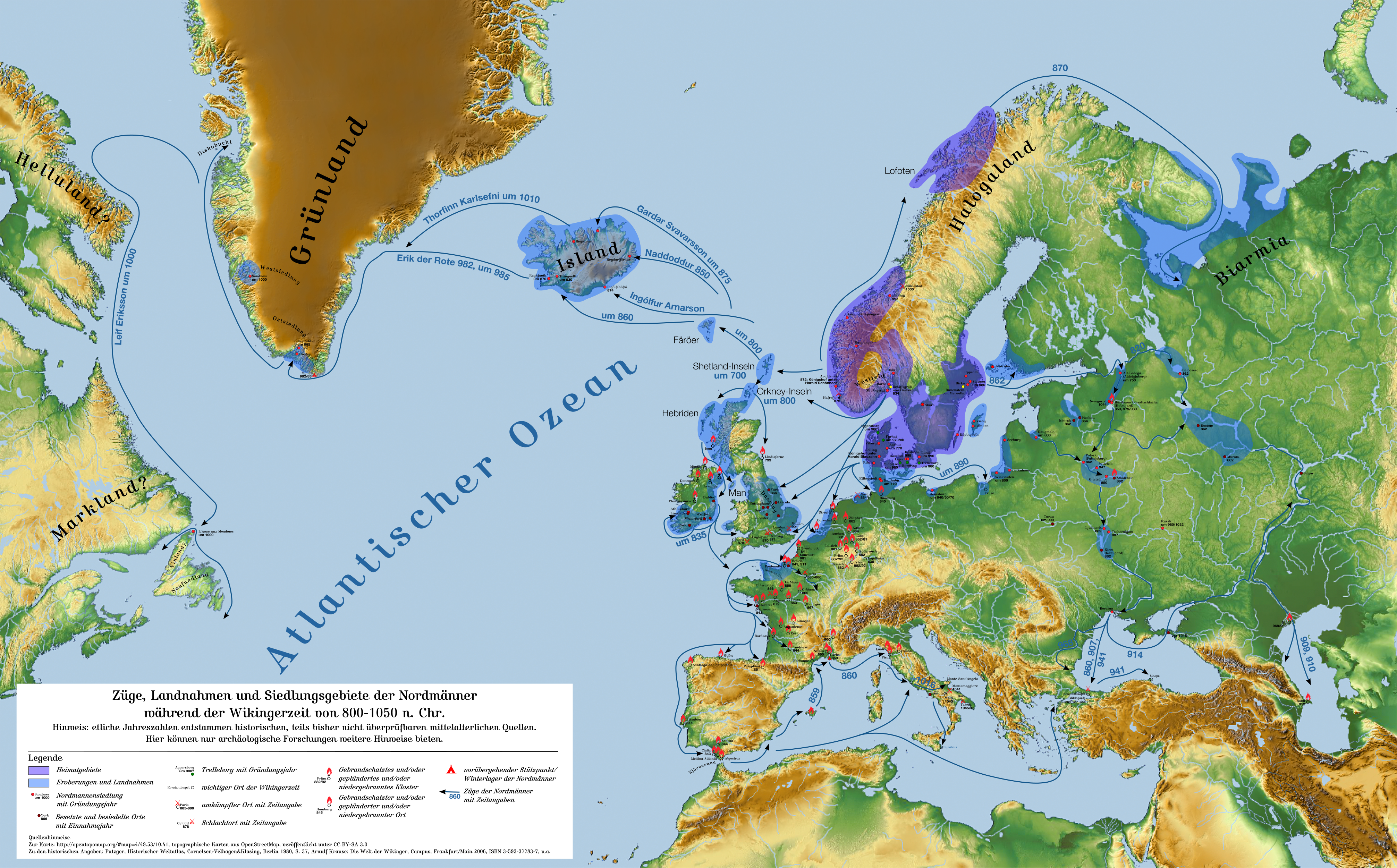 Züge, Landnahmen und Siedlungsgebiete der Nordmänner während der Wikingerzeit zwischen 800-1050. Die Quellen befinden sich in der Zeichnung selbst. Nordfriisk: Raisen (blä) an wensteeden (brons) faan a wikingern uun't 1. juardüüsen.